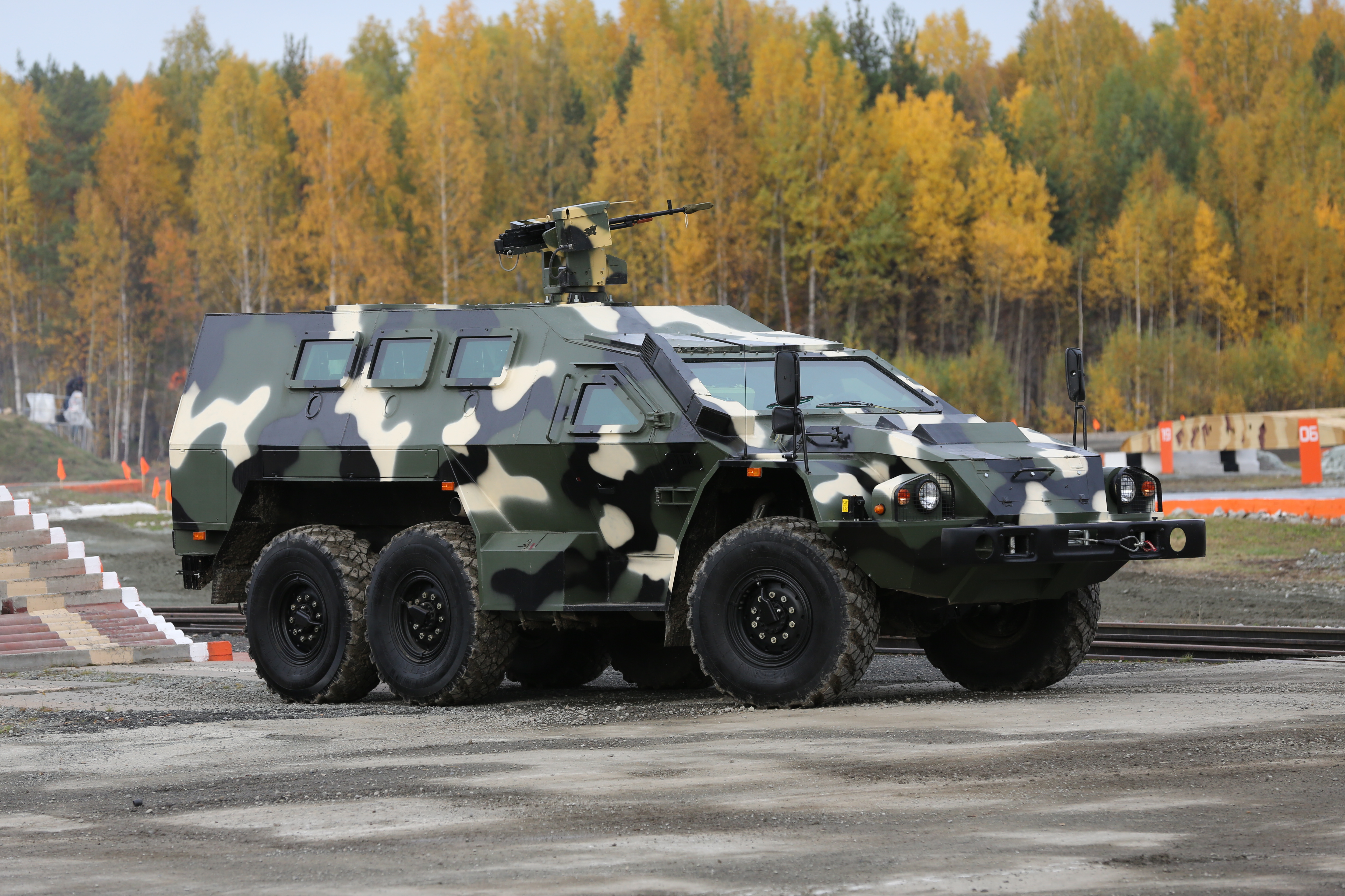 Специальный бронированный автомобиль СБА-60К2 Булат на базе КАМАЗ-5350 с боевым модулем (SBA-60K2 Bulat armored vehicle with remote weapons turret)